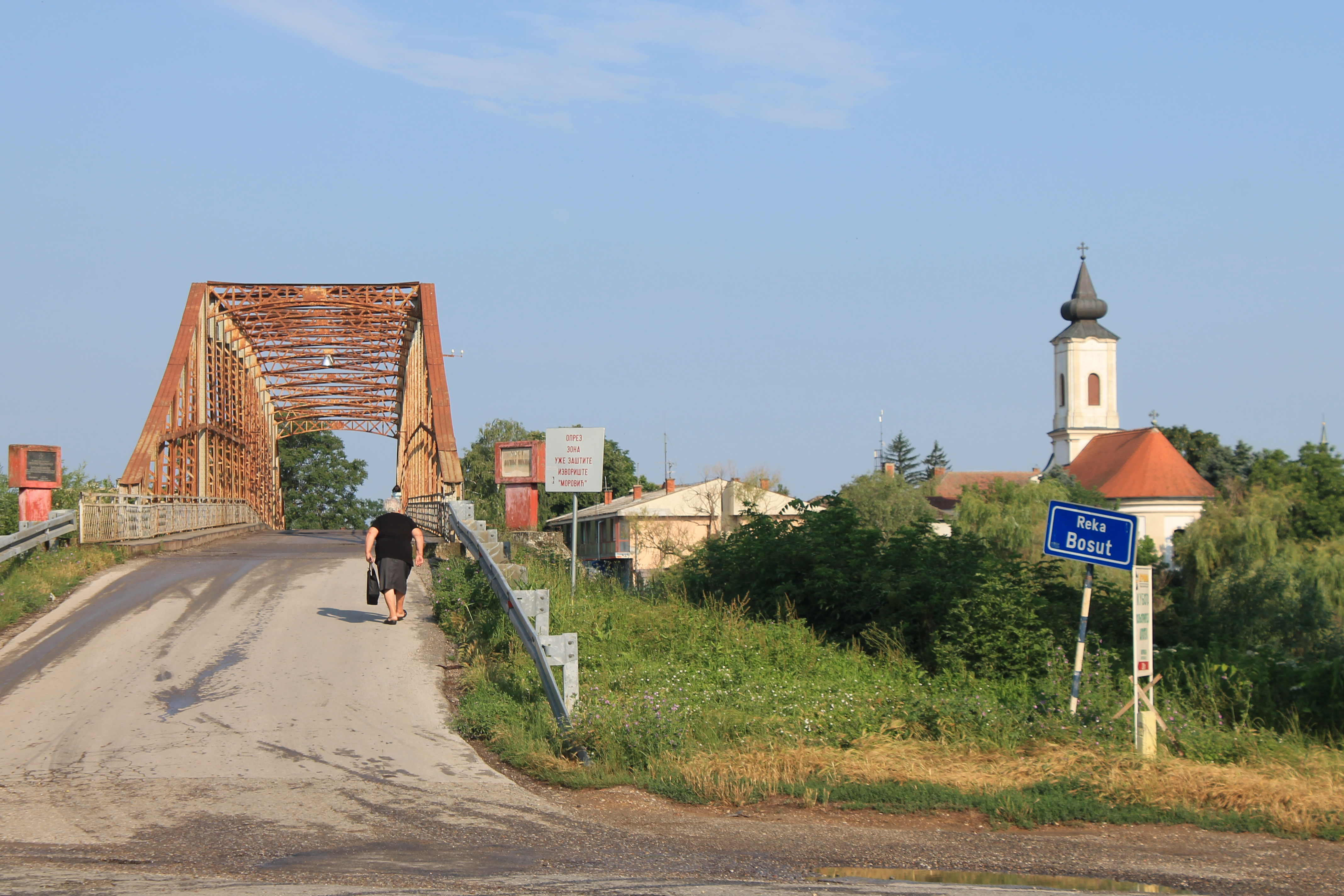 Morović